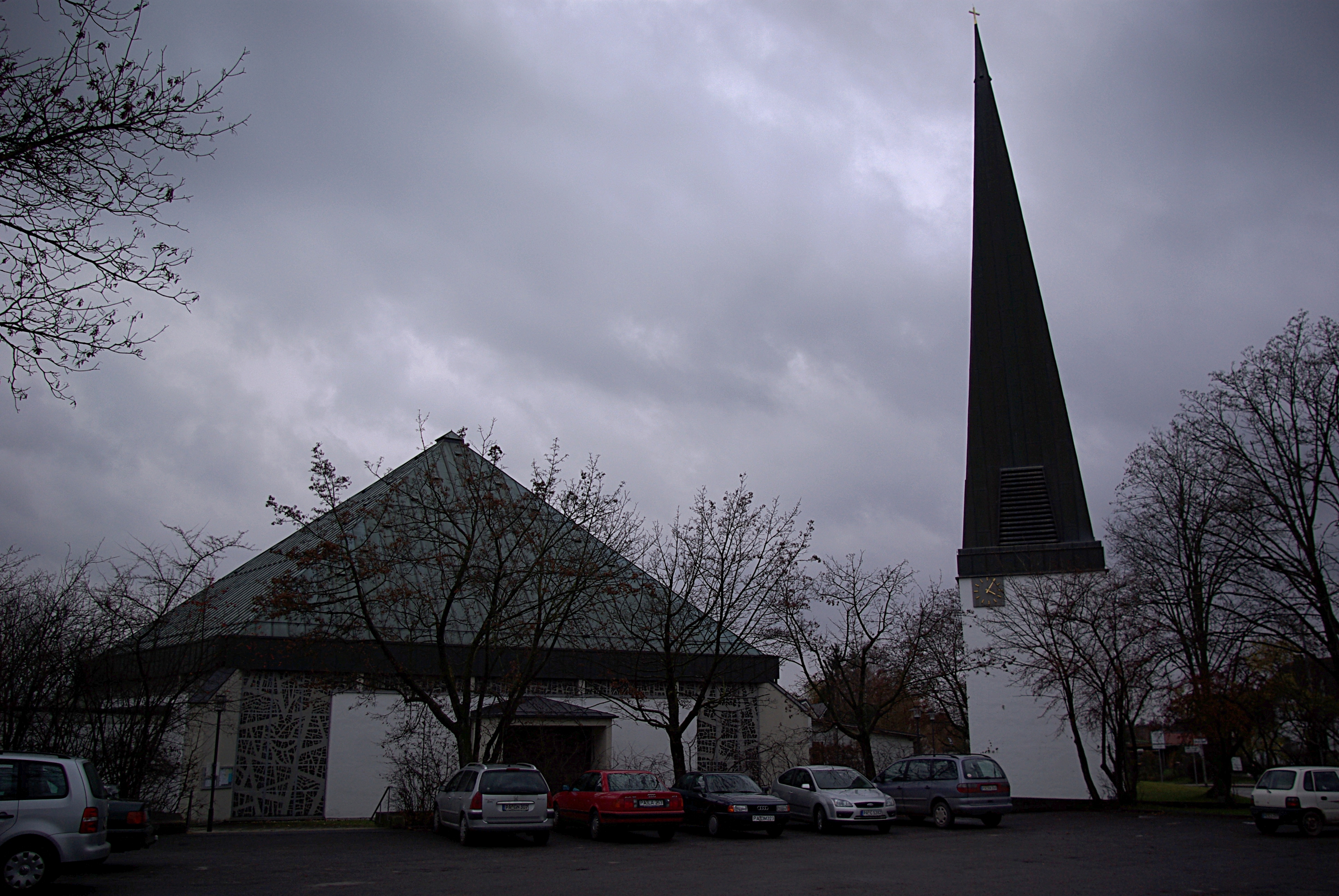 Salzweg in Bayern. Die Pfarrkirche in Salzweg.